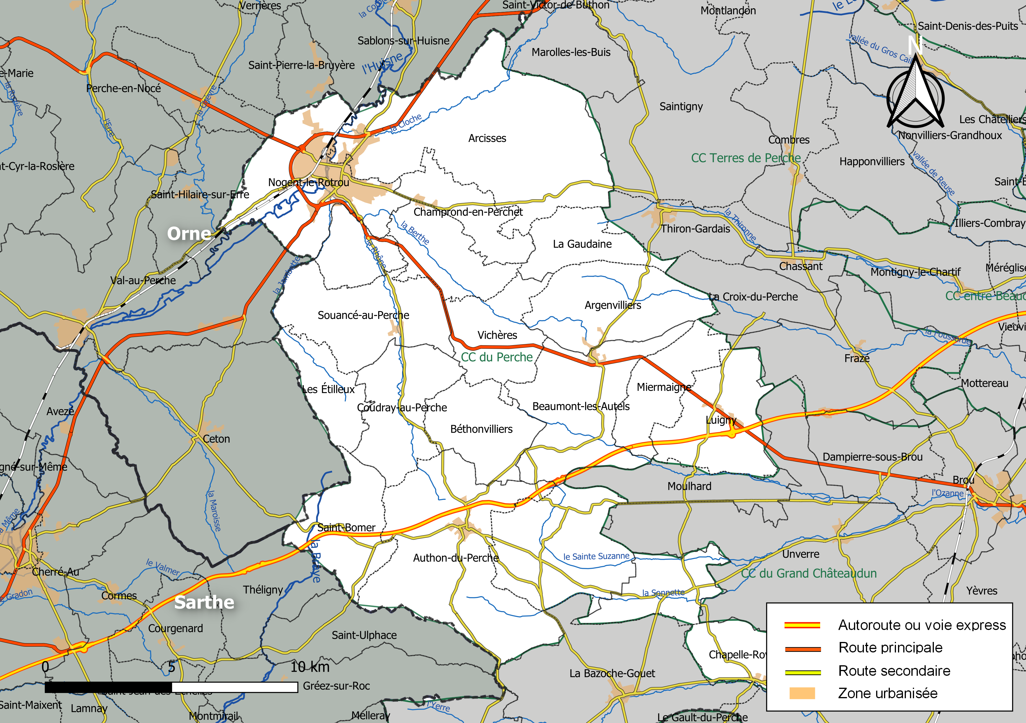 Carte géographique de la communauté de communes du Perche, département d'Eure-et-Loir, France. Composition au 1er janvier 2019.